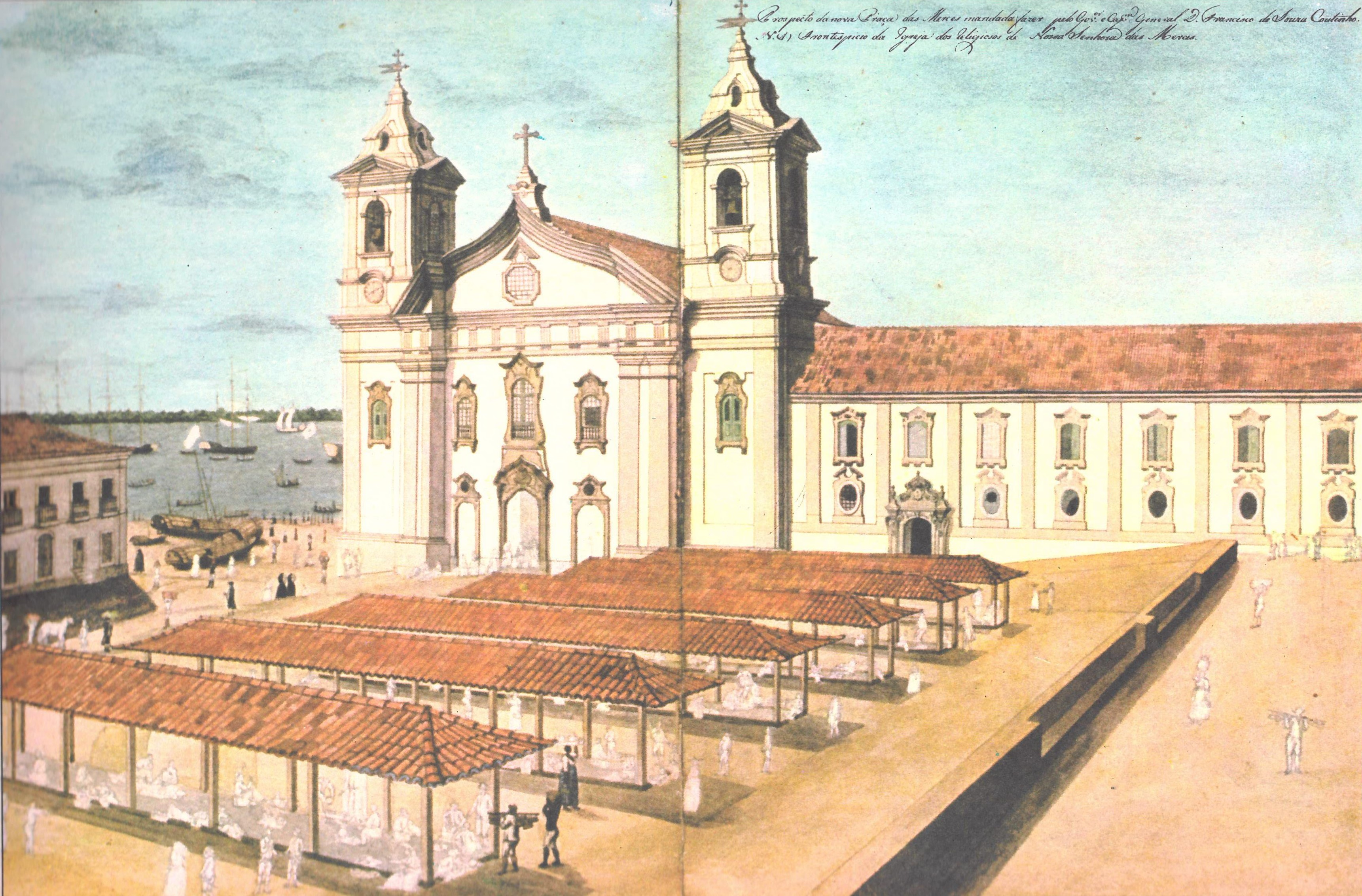 Ilustração em Viagem Filosófica pelas capitanias do Grão Pará, Rio Negro, Mato Grosso e Cuiabá.